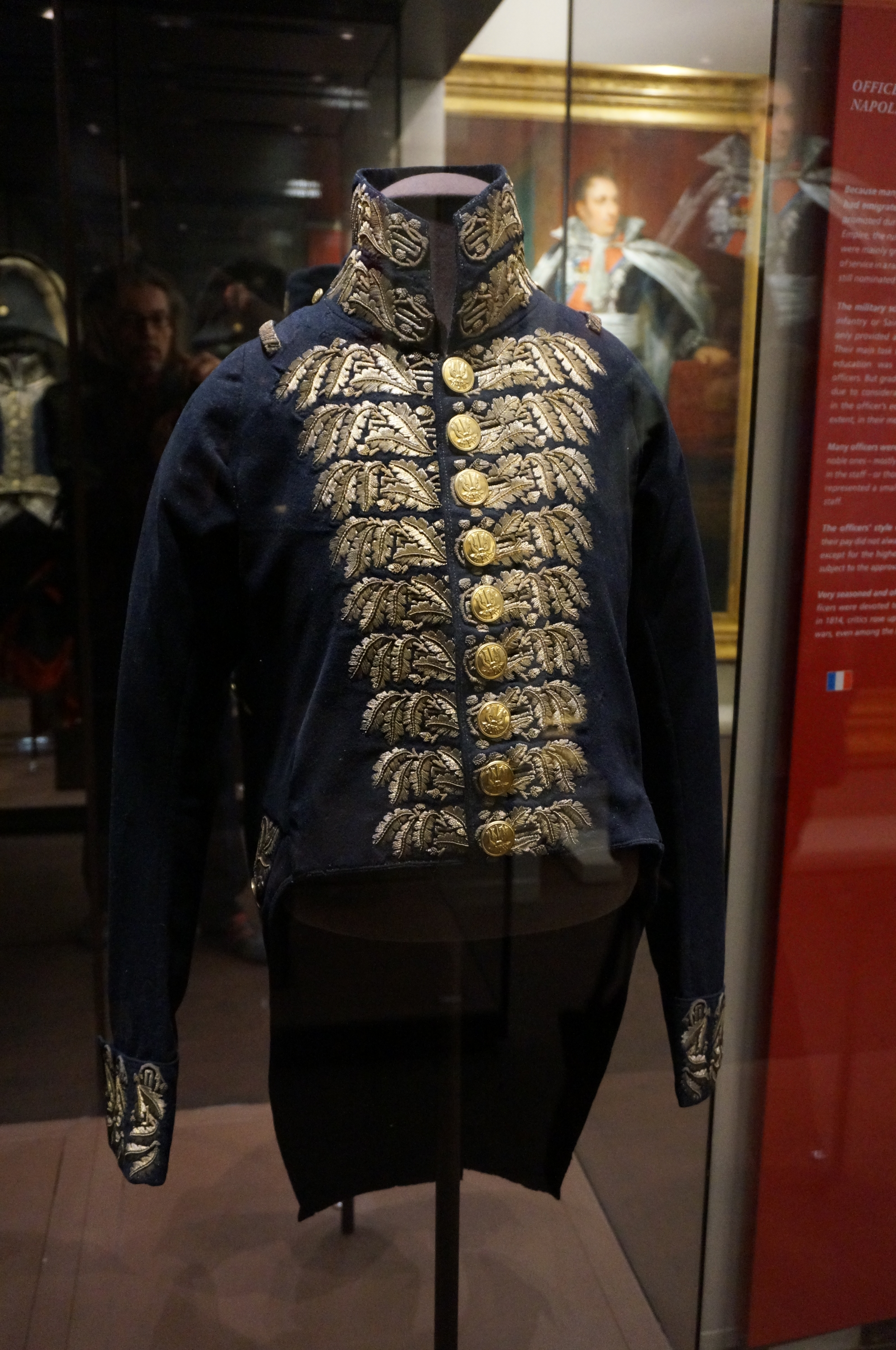 Présentation au Musée de l'armée.